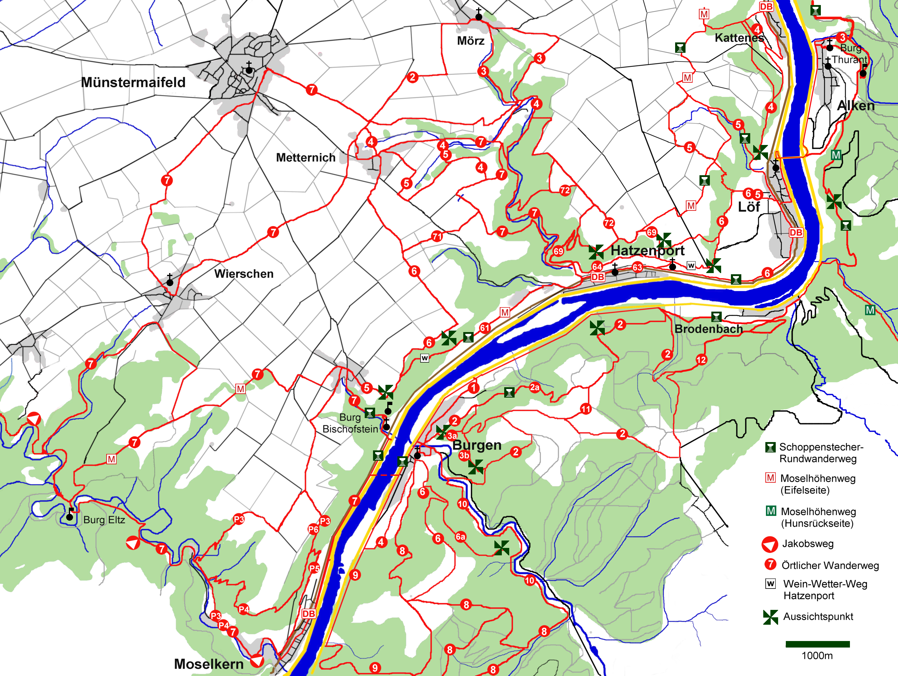 Umgebungswanderkarte; Bischofstein, Hatzenport, Mosel